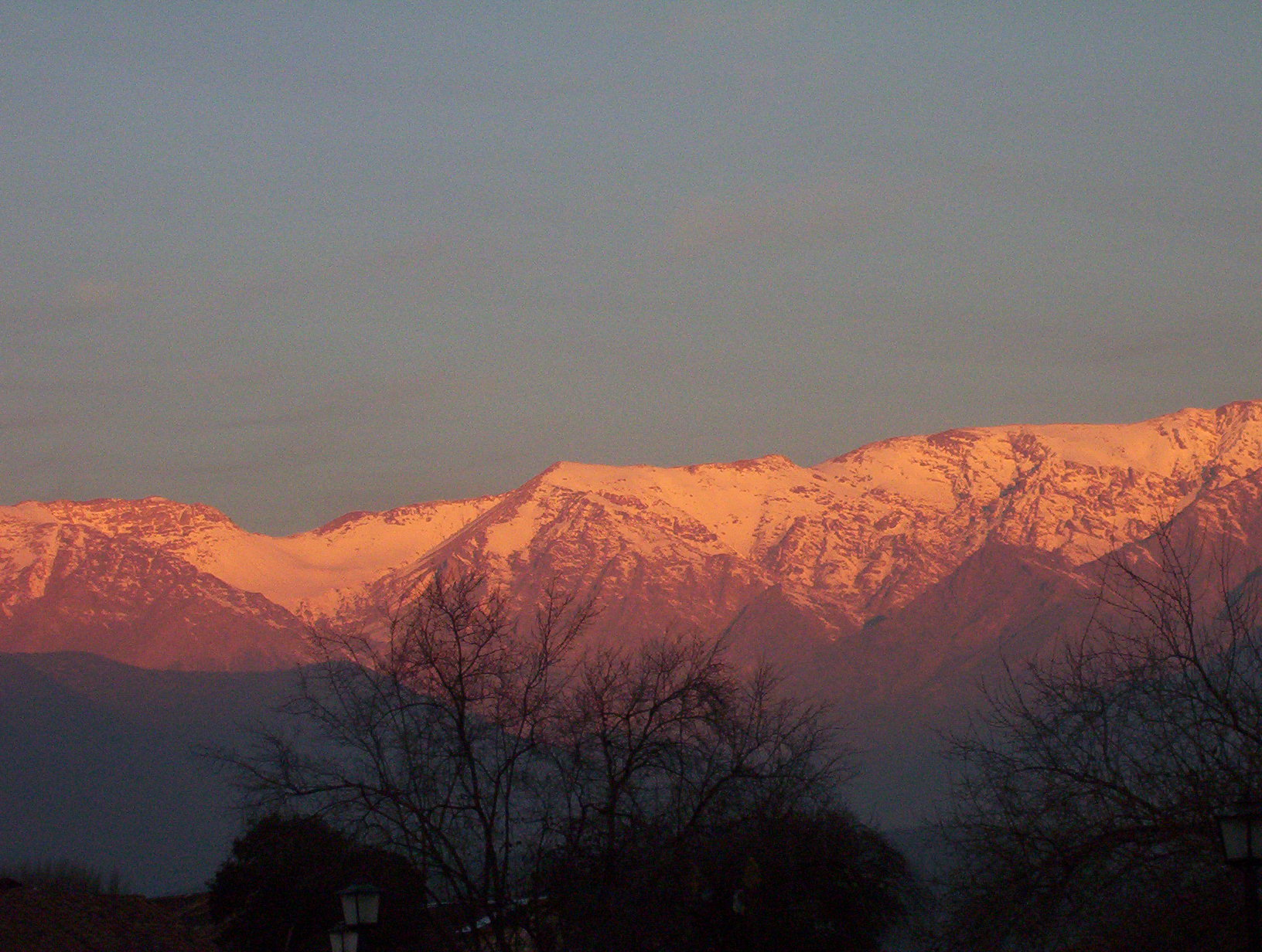 Cerro de Ramón visto desde Apoquindo